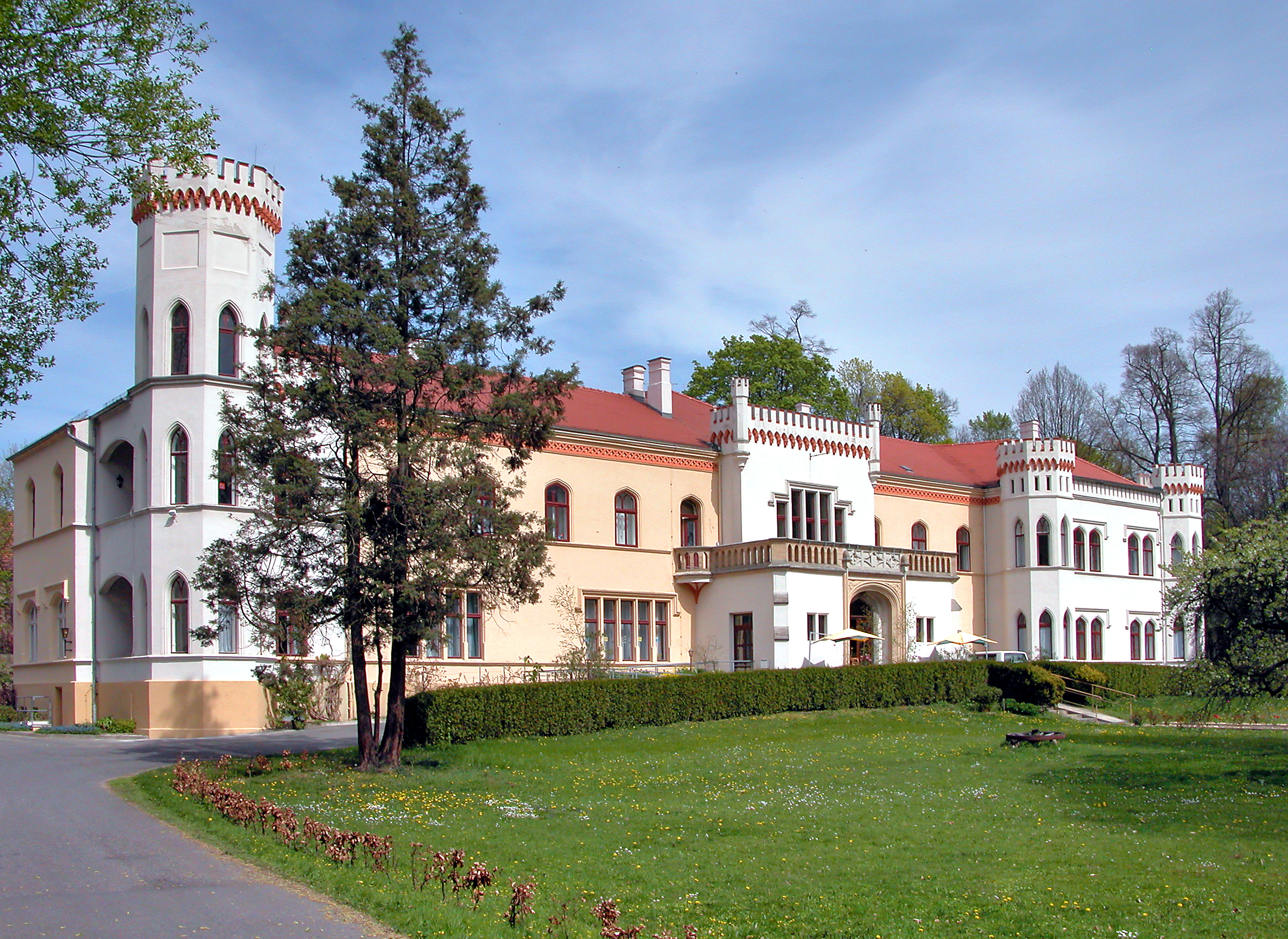 23.04.2007 02894 Mengelsdorf (Reichenbach OL): Ehemaliges Rittergut (GMP: 51.156984,14.803145), seit dem 14. Jahrhundert bezeugt. Schloßneubau um 1860 im Stil der englischen Tudorgotik (GMP: 51.156382,14.803987). Heute Caritasheim "St. Hedwig". Parkseite. [DSCN22158.TIF]20070423325DR.JPG(c)Blobelt